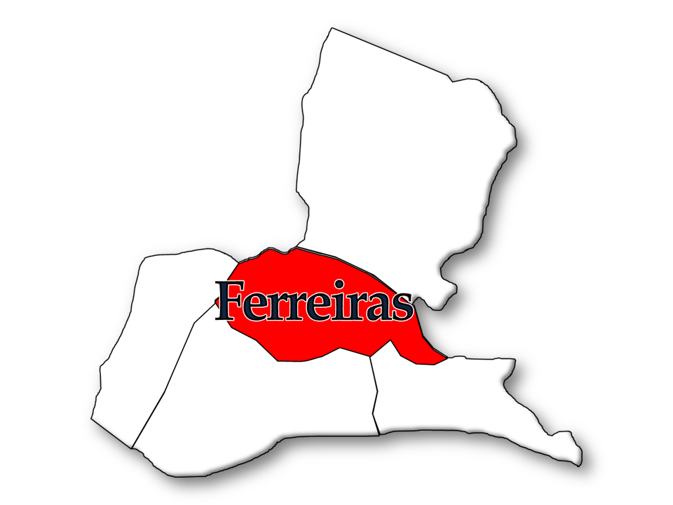 Censos 1864/2011